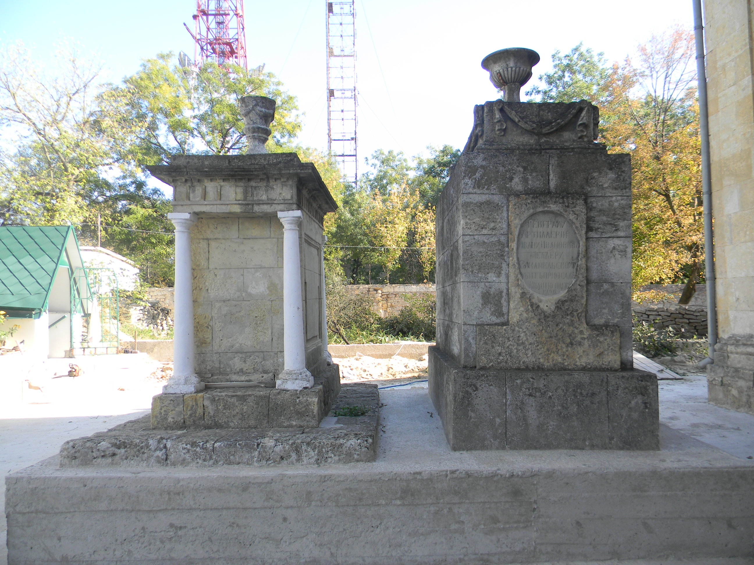 Комплекс поховань на території Катерининського (Спаського) собору, Херсон, вул. Перекопська, 13